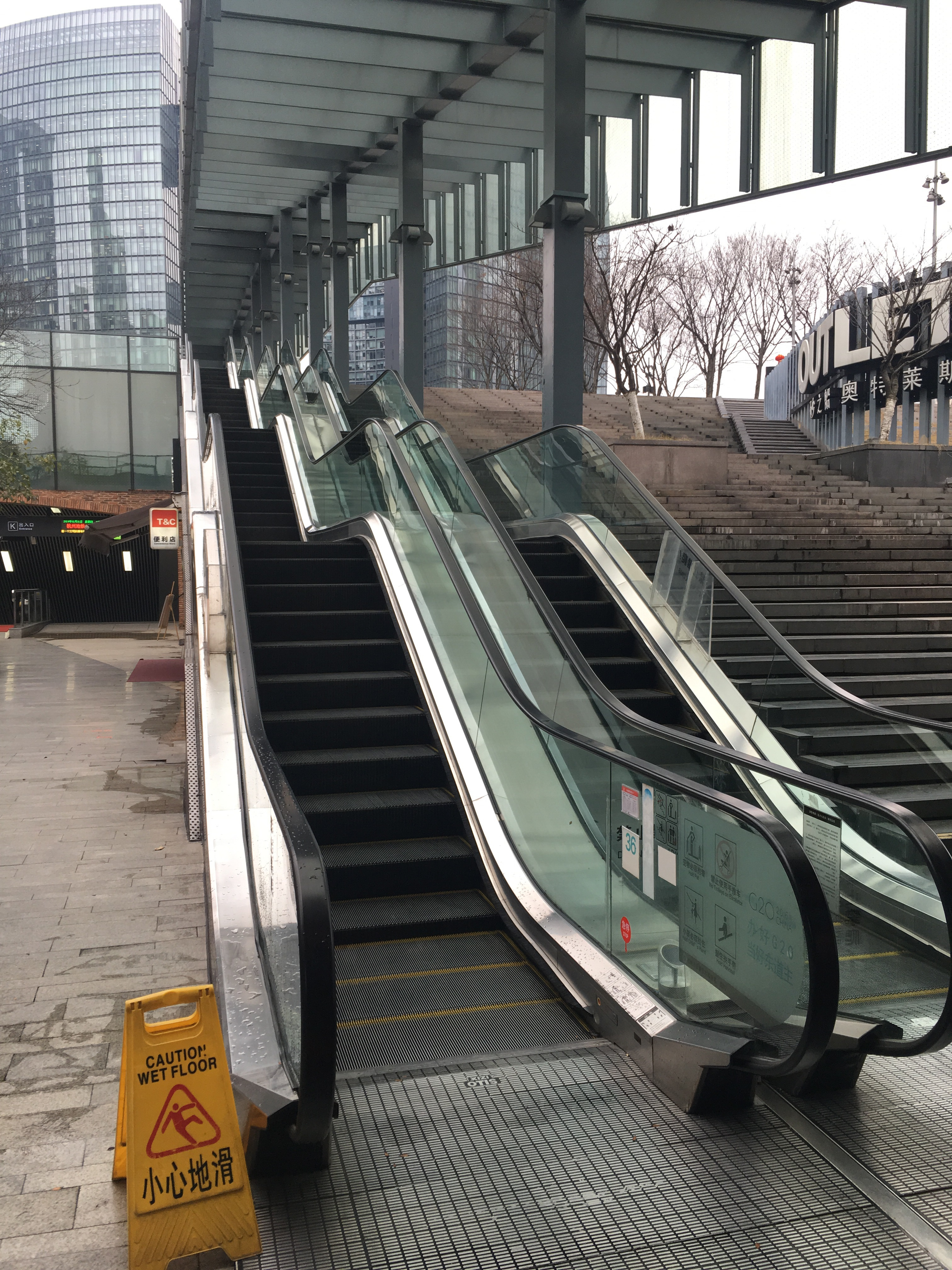 波浪文化城分级提升自动扶梯